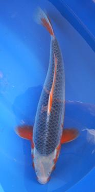 vom Besitzer geschenkt bekommen